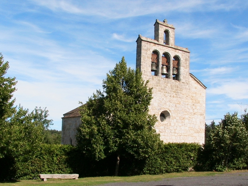 Eglise de Vareilles